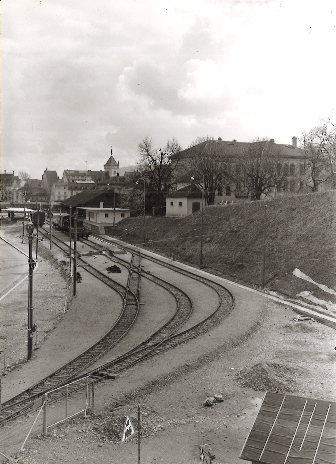 Rollschemelanlage der Werkbahn/Güterbahn der Georg Fischer AG im Mühlental in Schaffhausen